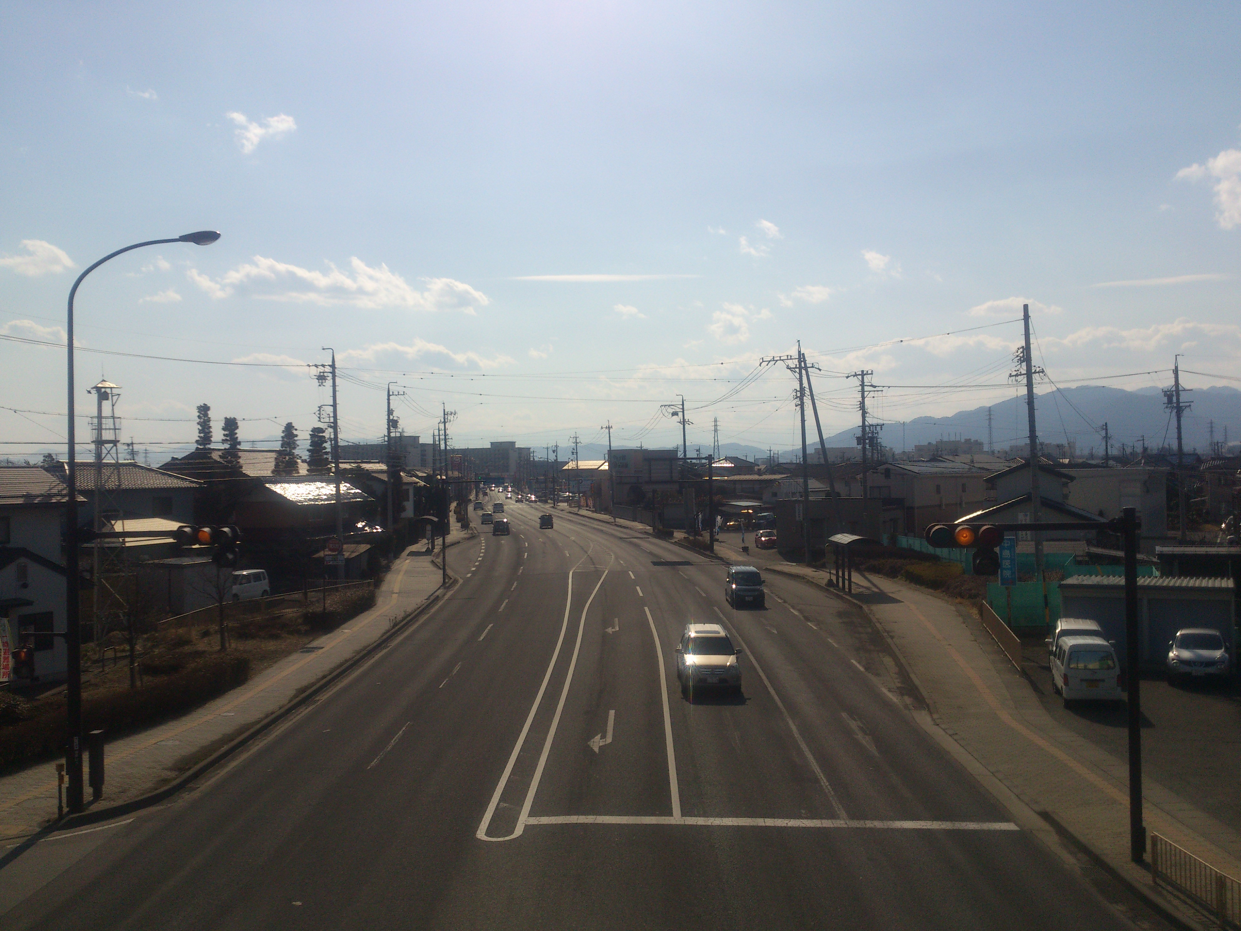 国道18号長野バイパス（長野市柳原から長野市街地方面を望む）